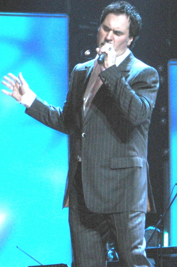 фото Валерия Меладзе на концерте в "Олимпийском", 2008 г.